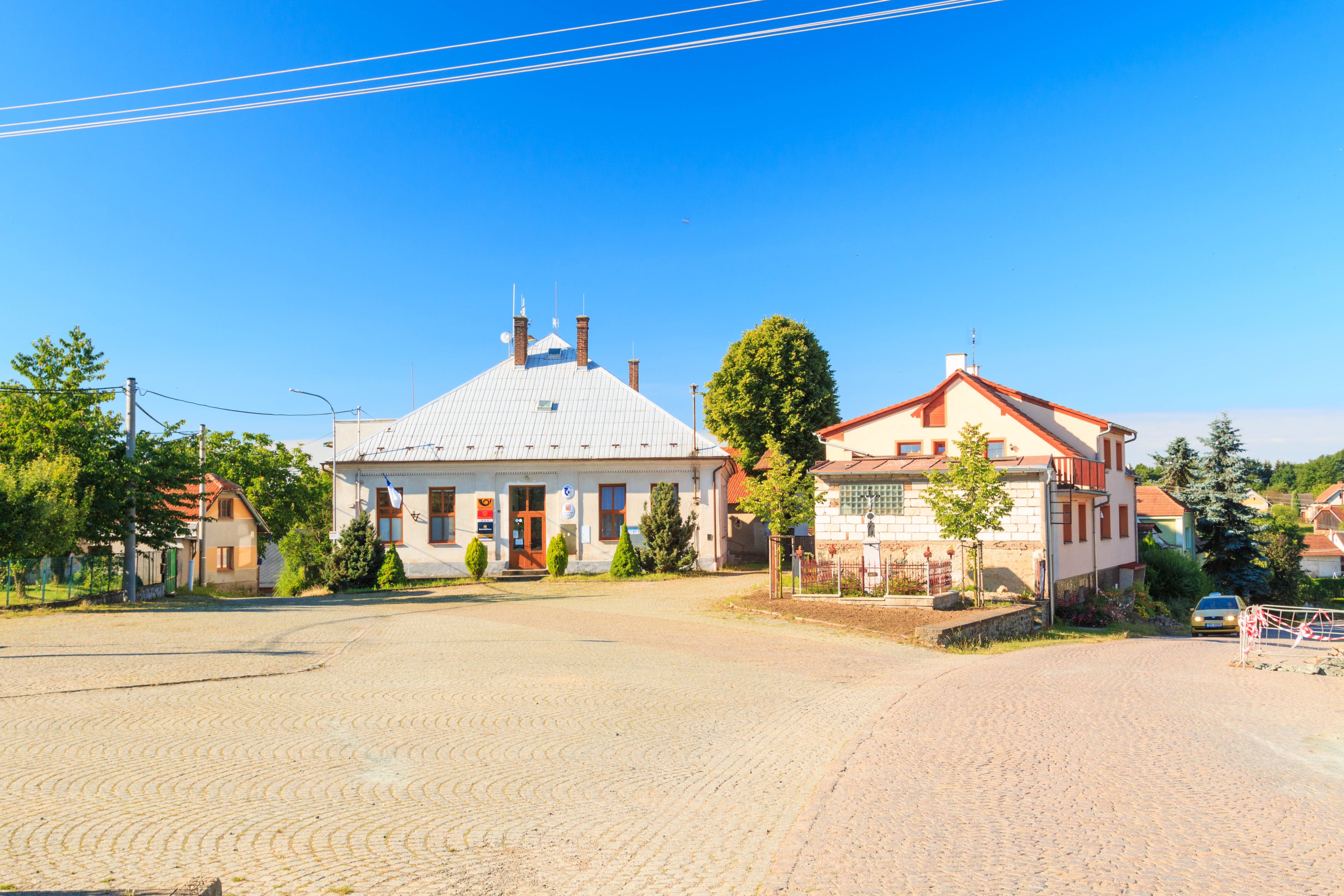 Paběnice obecní úřad